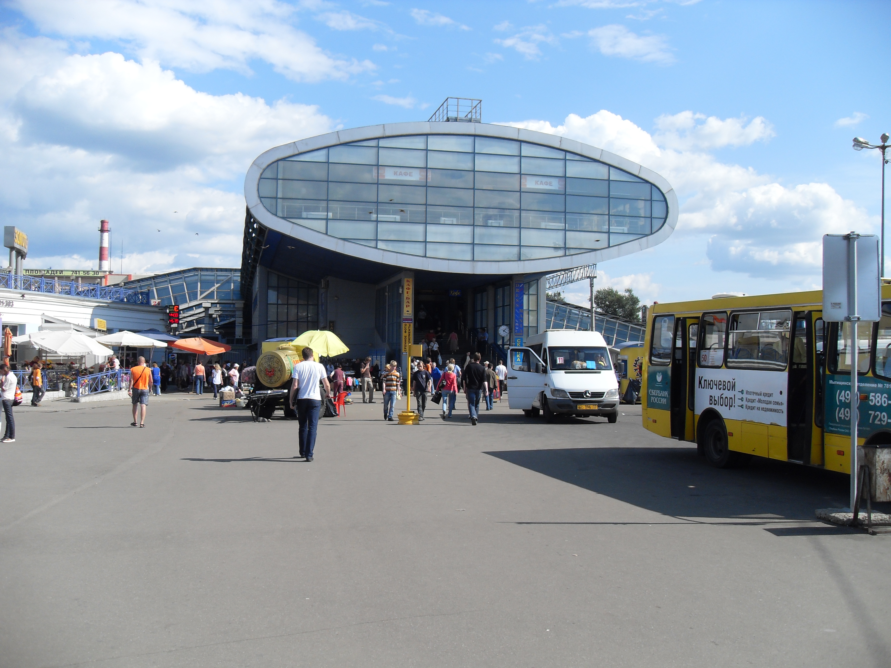 Станция Мытищи, конкорс.